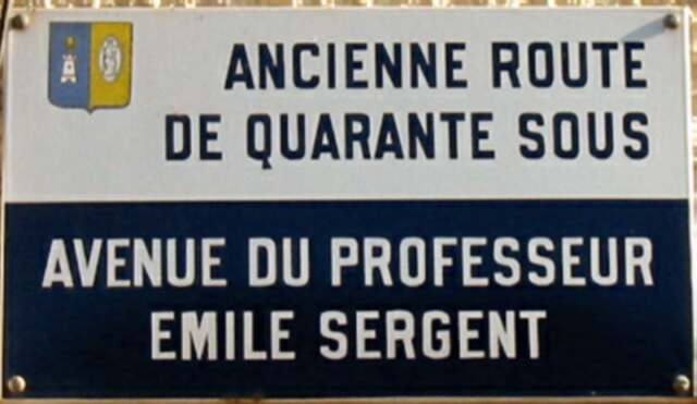 Plaque de rue (route de quarante sous) à Épône (Yvelines) Photo JH Mora, août 2005